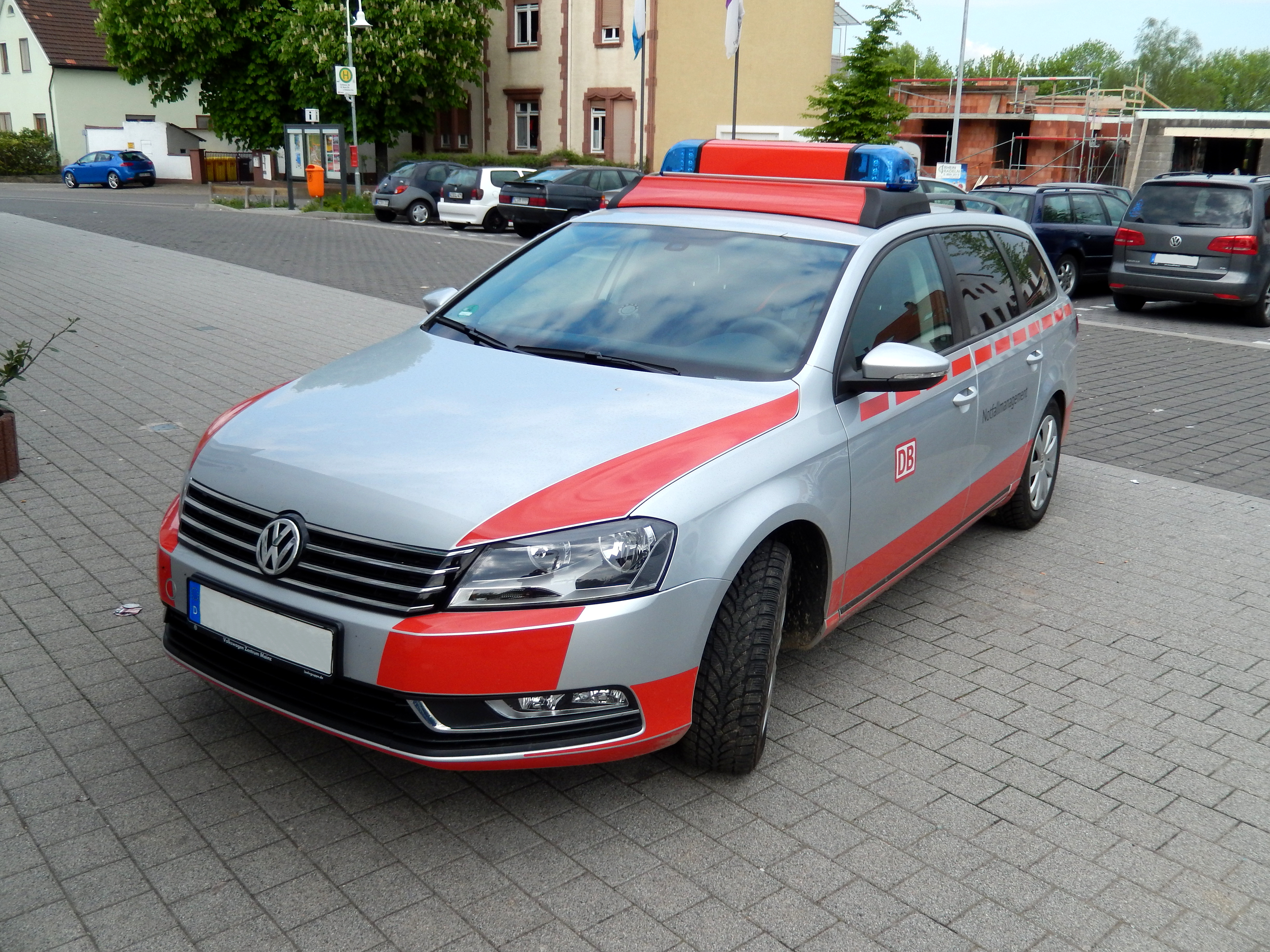 Fahrzeug „Notfallmanagement“ der Deutschen Bahn am Bahnhof Guntersblum